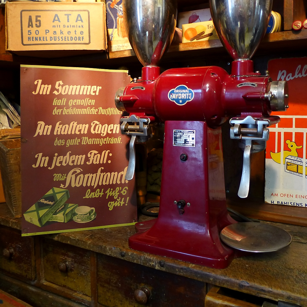 Werbetafel für "Kornfranck" Kaffee-Ersatz (Surrogat), ein Exponat im Museum Wustrow, Niedersachsen. Die Marke geht zurück auf die 1913 gegründete Fabrik Heinr. Franck Söhne, heute inaktiv. Zutaten von Kornfranck: Gerste, Gerstenmalz, Zichorie, Roggen.